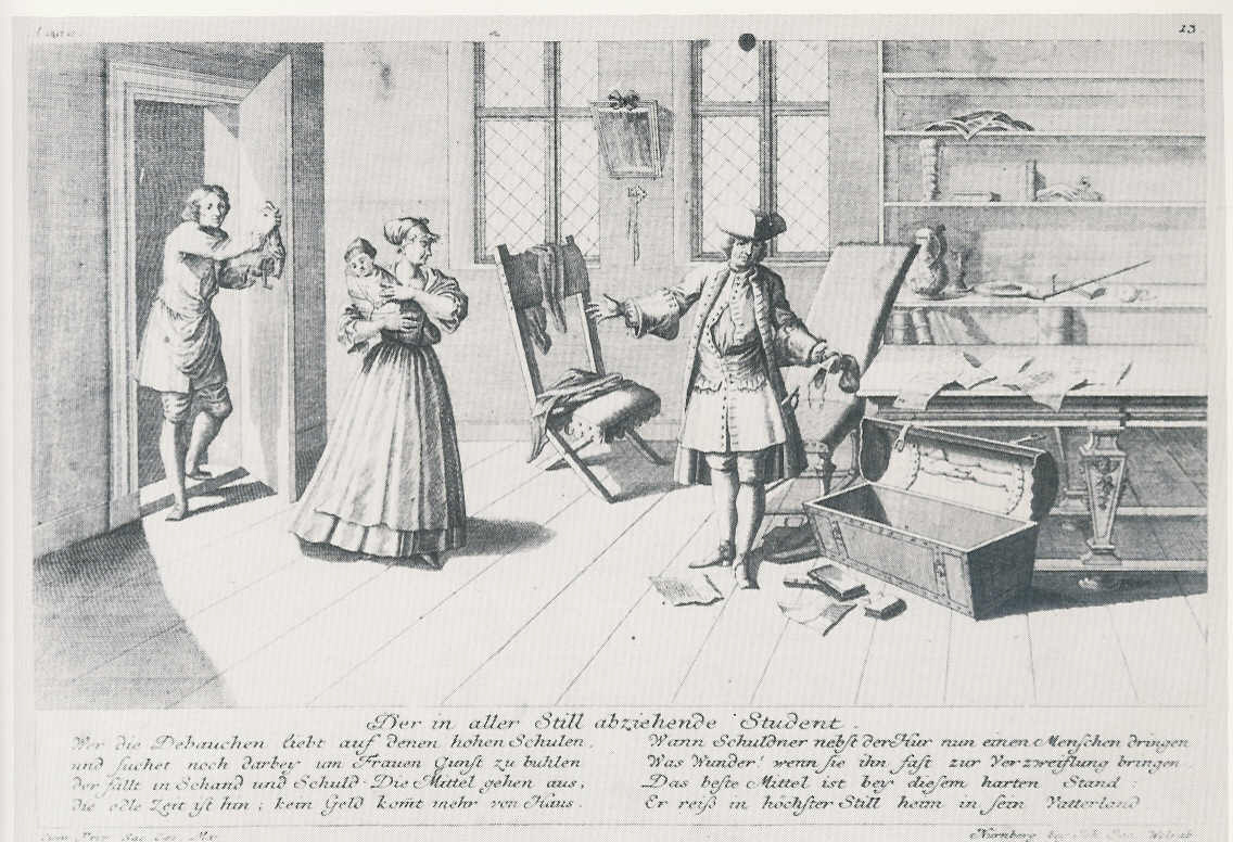 "Dendrono" (Johann Georg Puschner), "Der in aller Still abziehende Student", Kupferstich von 1725, Szenen aus dem Leben der Studenten an der Universität Altdorf: Der in aller Still abziehende Student Wer die Debauchen liebt auf denen hohen Schulen, und suchet noch darbey um Frauen Gunst zu buhlen der fällt in Schand und Schuld. Die Mittel gehen aus, die edle Zeit ist hin; kein Geld kommt mehr von Haus. Wann Schuldner nebst der Hur nun einen Menschen dringen Was Wunder! Wenn sie ihn fast zur Verzweiflung bringen. Das beste Mittel ist bey diesem harten Stand: Er reiß in höchster Still heim in sein Vatterland. Rechte abgelaufen, Public Domain